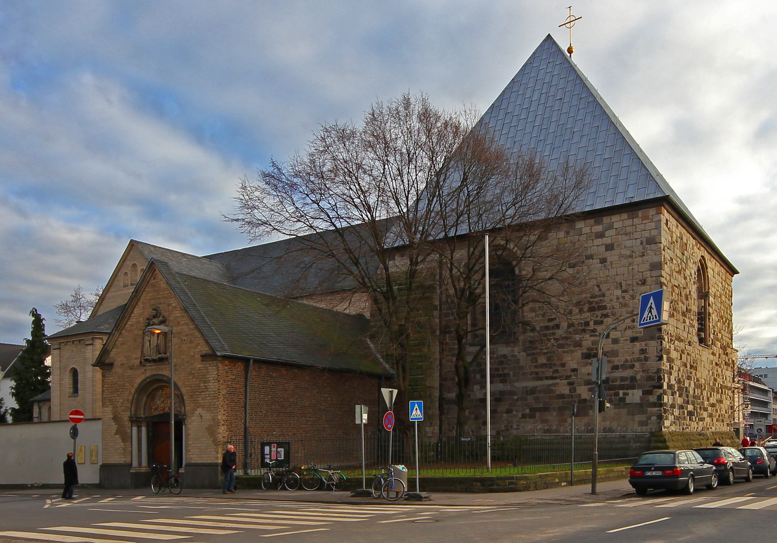 Vorhalle und Nordfassade der Georgskirche in der Kölner Südstadt, Deutschland.